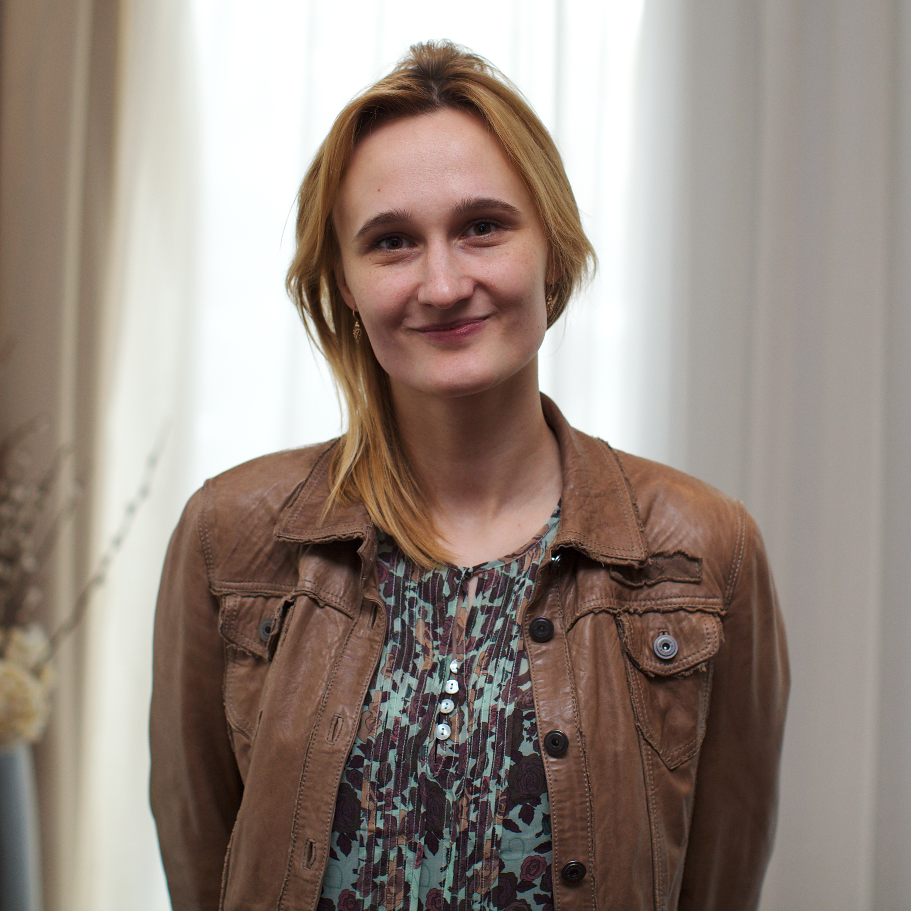 Viktorija Cmilyte